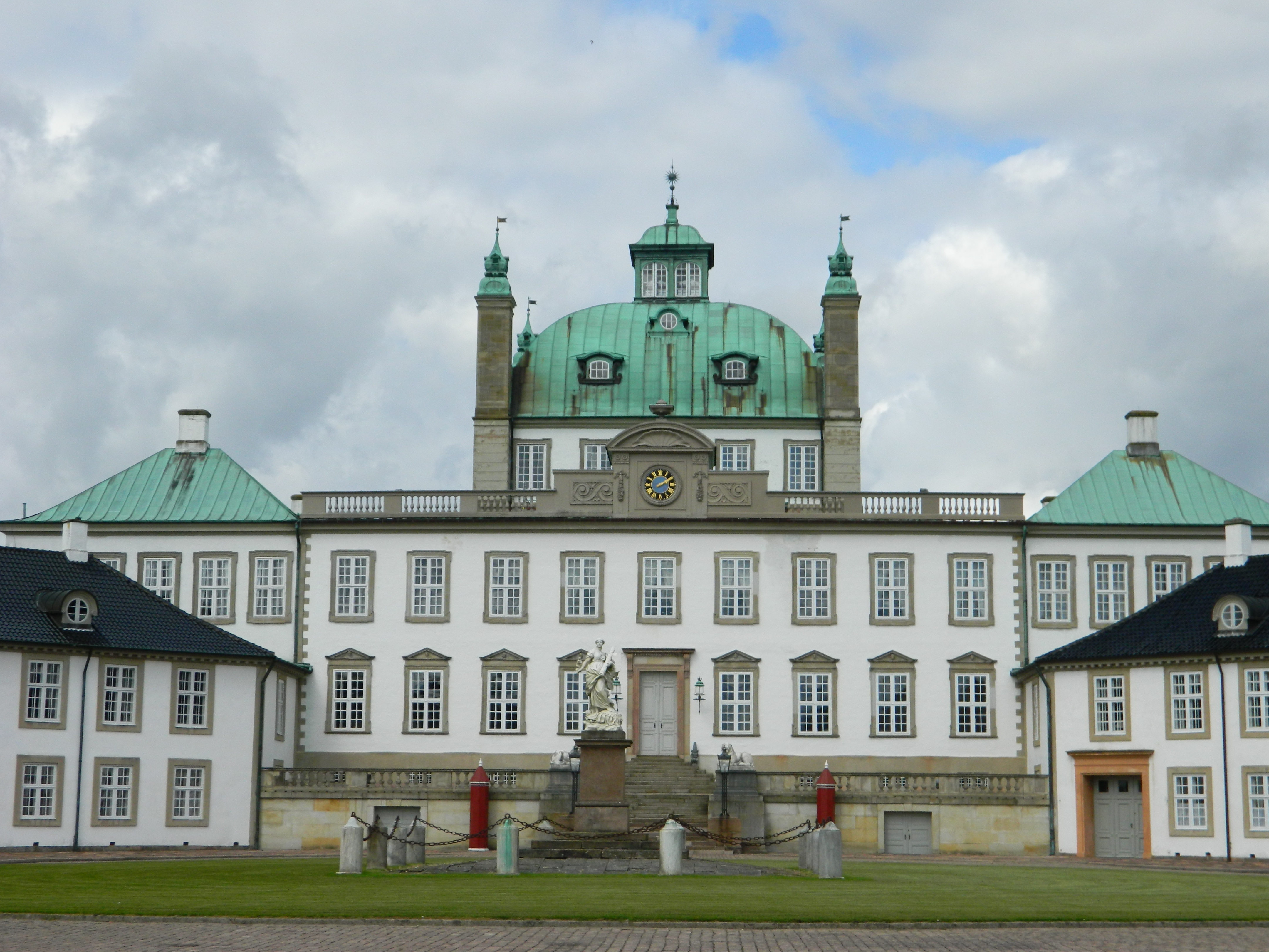 Fredensborg Palace